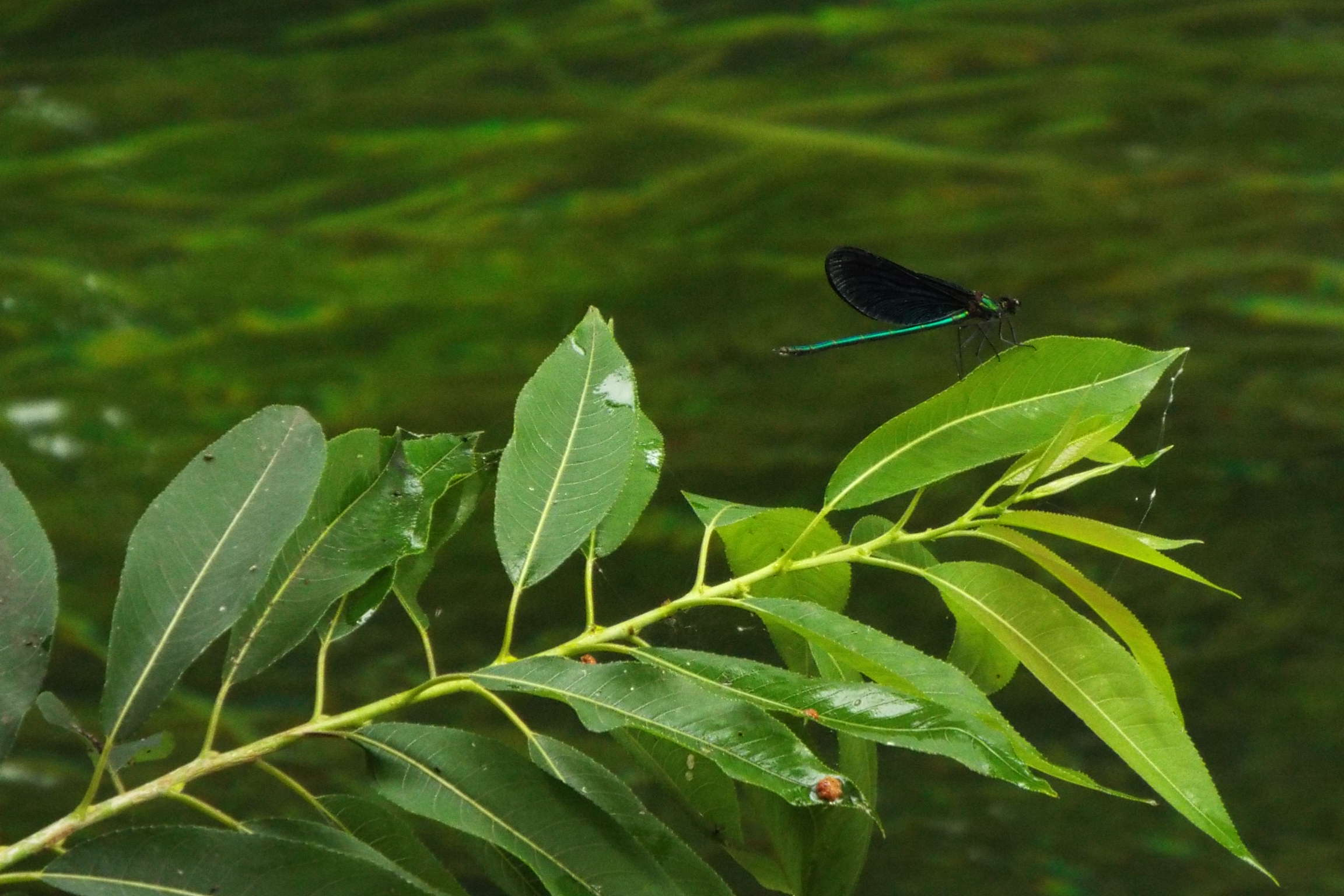 Daio Wasabi Farm 大王わさび農園 蓼川,アオハダトンボ Calopteryx japonica male